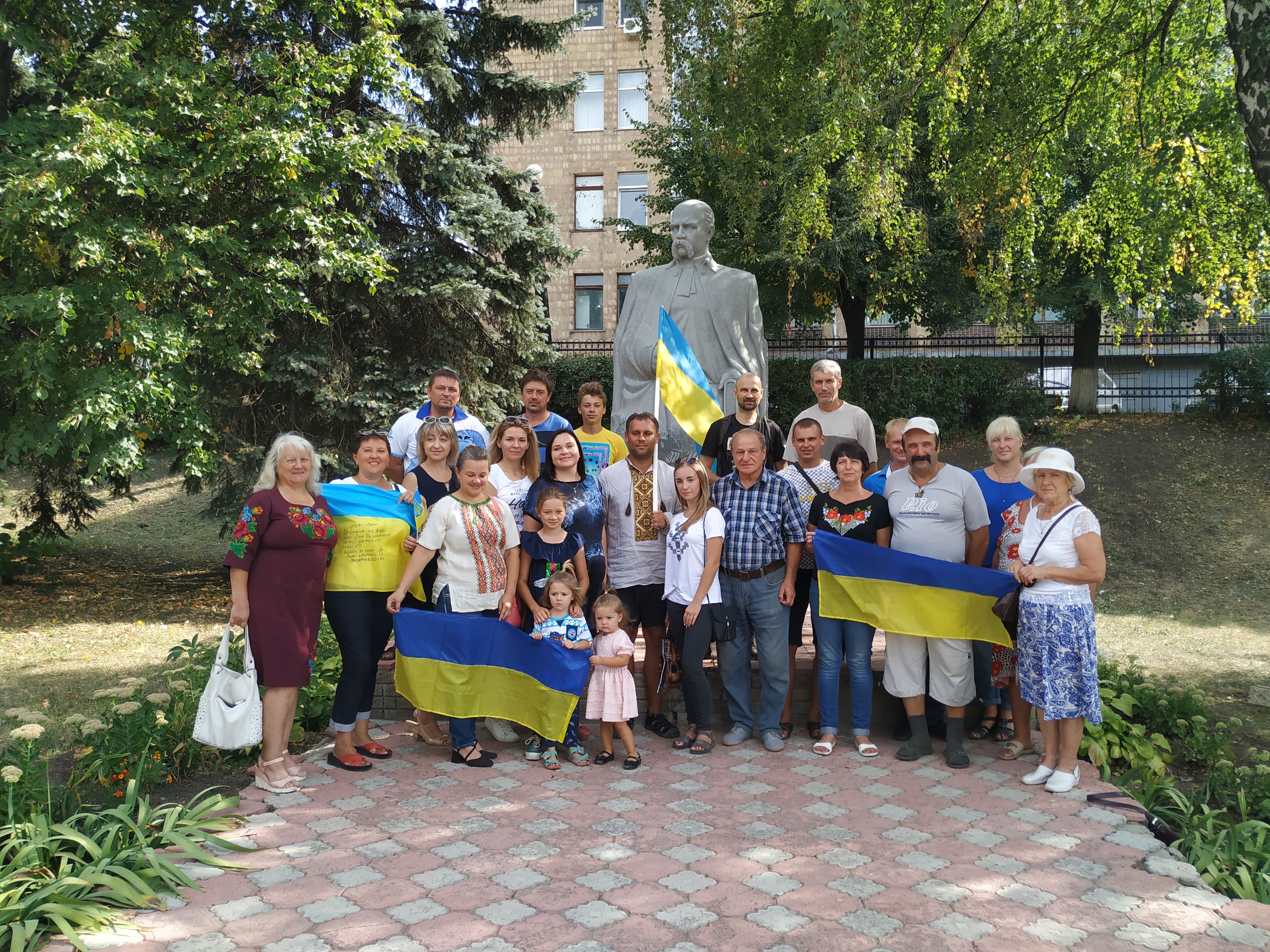 ТД 2-03 Куп'янськ